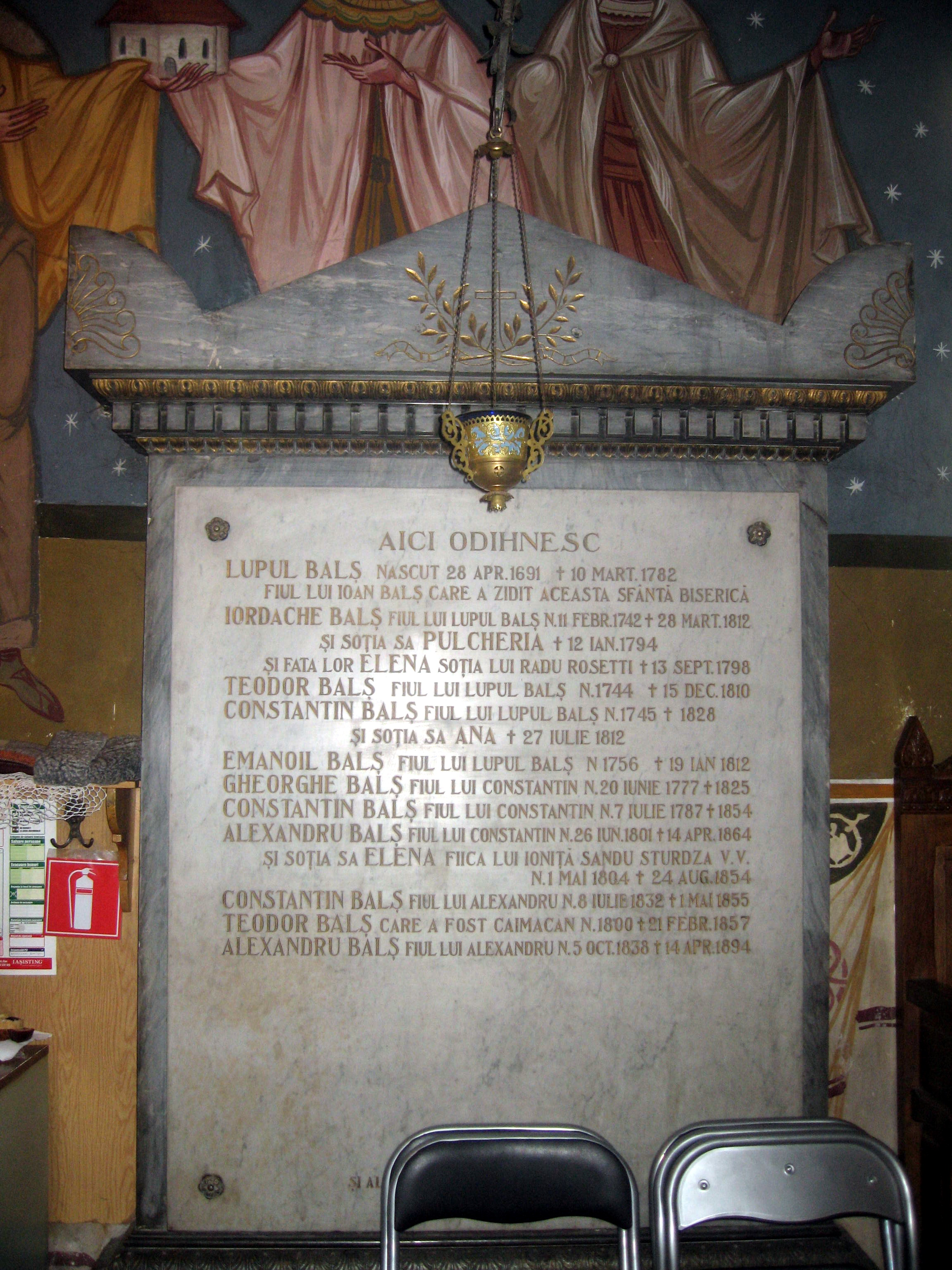 Biserica Sf. Dumitru Bals din Iasi